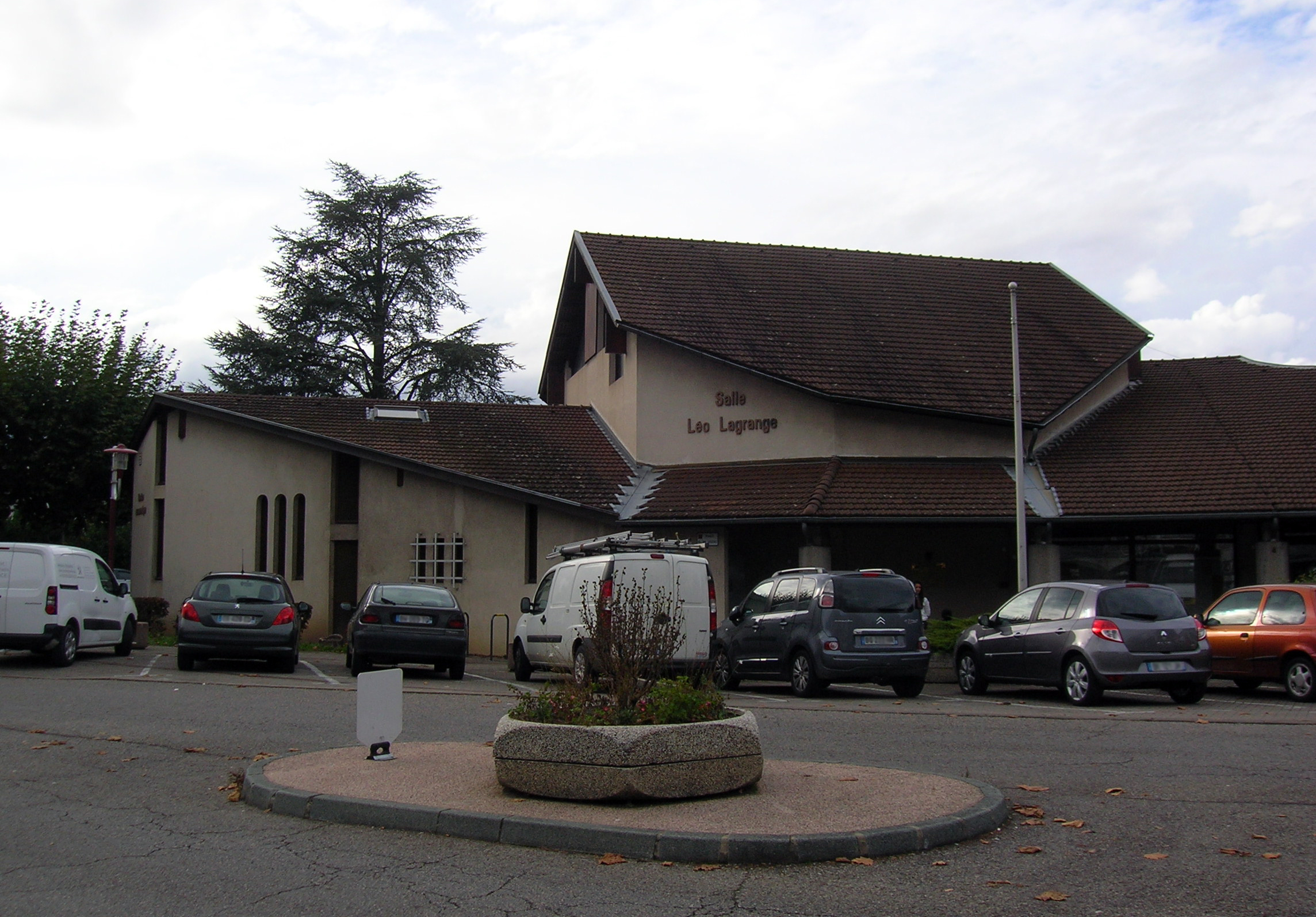 Salle Leo Lagrange Poisat, Isère, Rhône-Alpes, France.